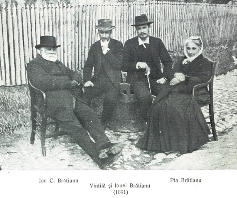 Ion C Brătianu, Pia Brătianu, Ion I.C. Brătianu şi Vintilă Brătianu, în 1891, puţin înaintea morţii lui Ion C. Brătianu